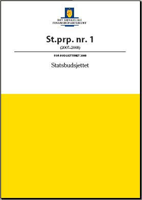 Statsbudsjettet 2008